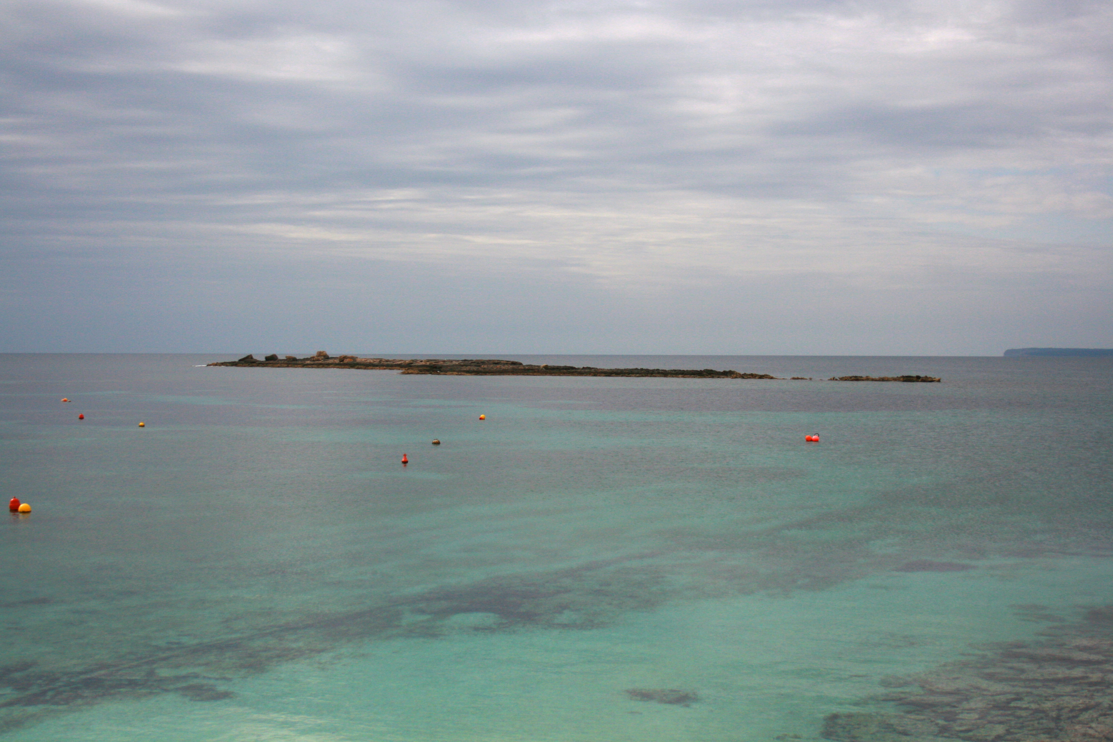 Colònia de Sant Jordi in Ses Salines, Mallorca, Spain